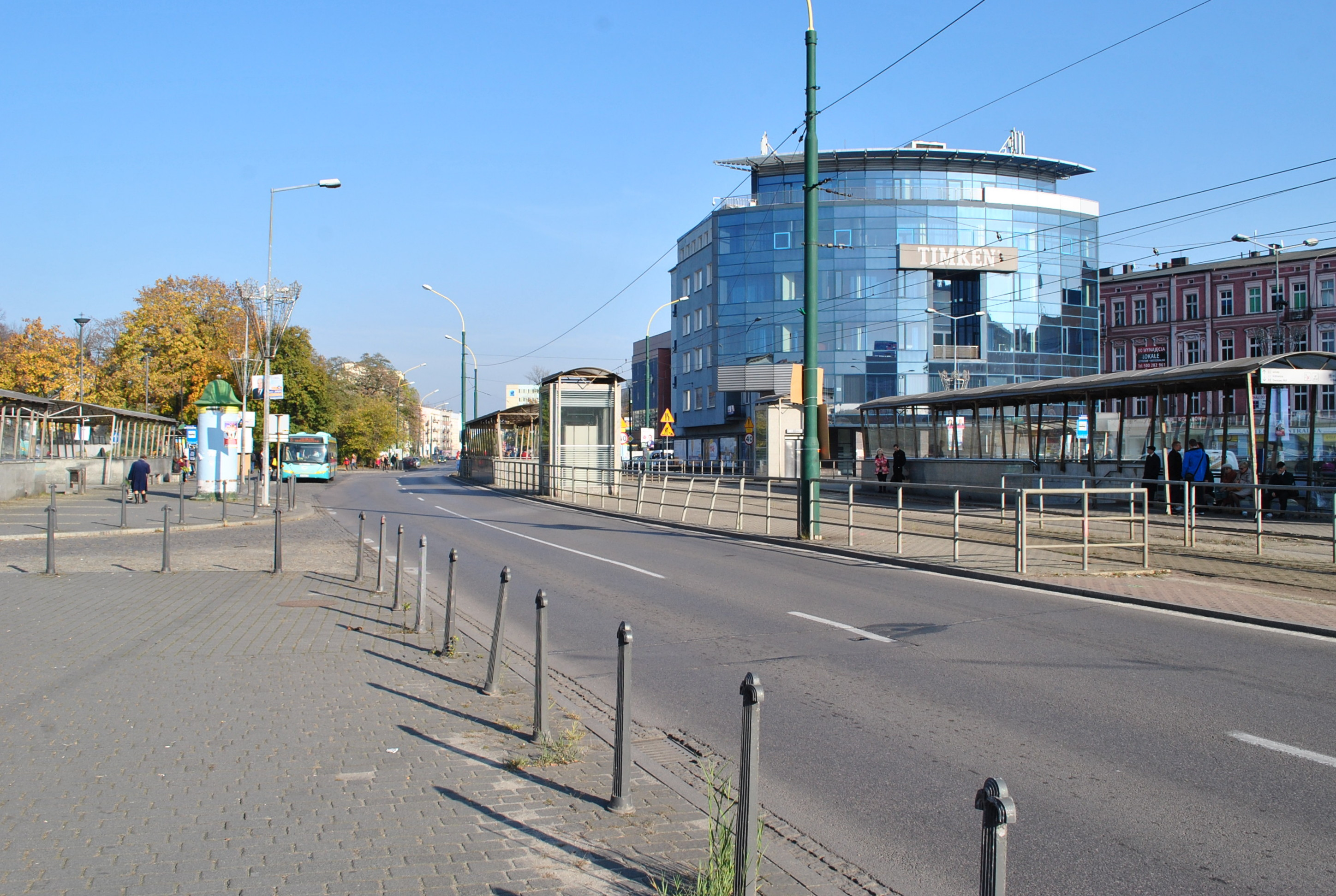 Sosnowiec. Ulica 3 Maja i widok na przystanek Sosnowiec Dworzec PKP